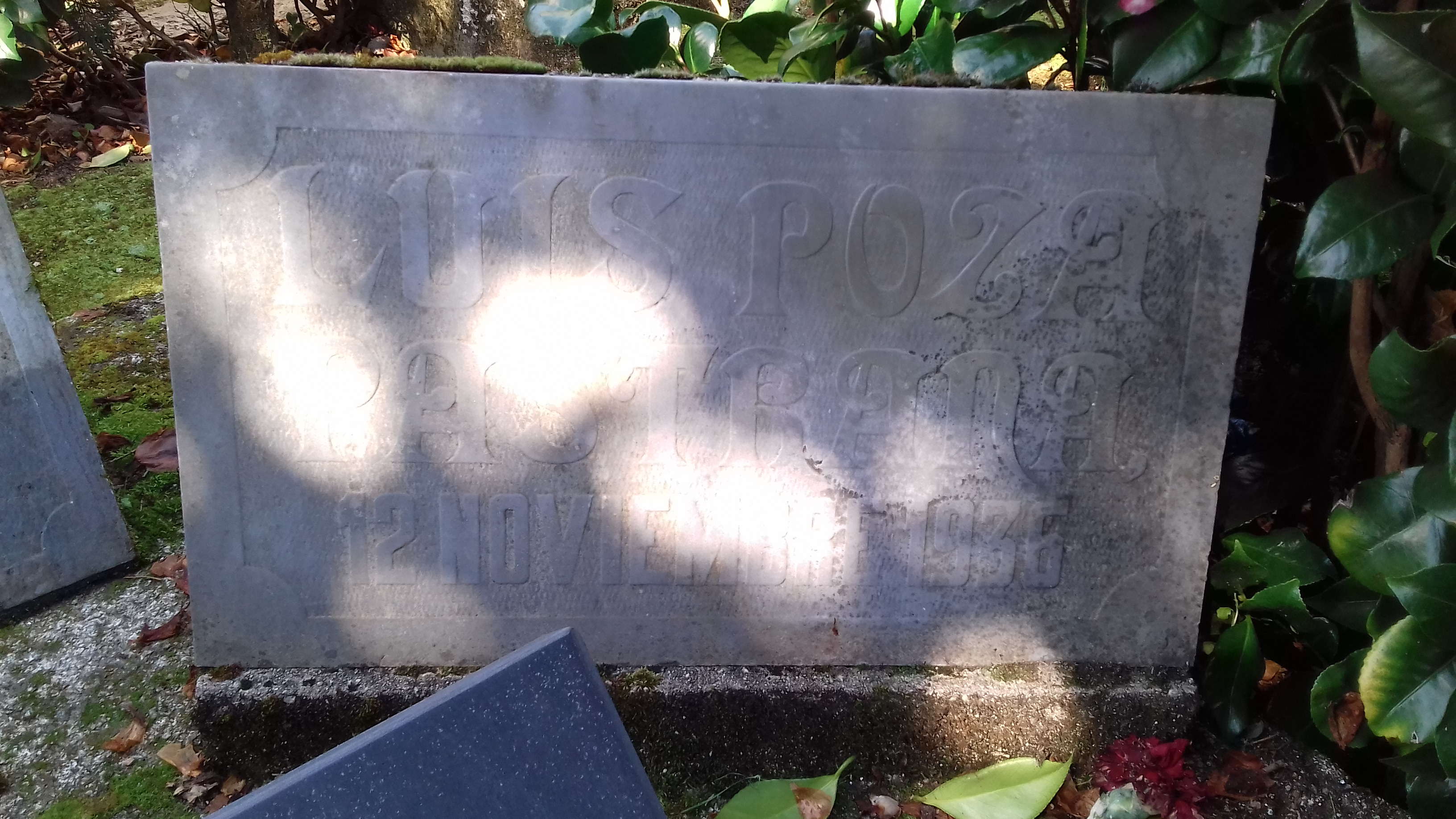 Lápida de Luis Poza Pastrana